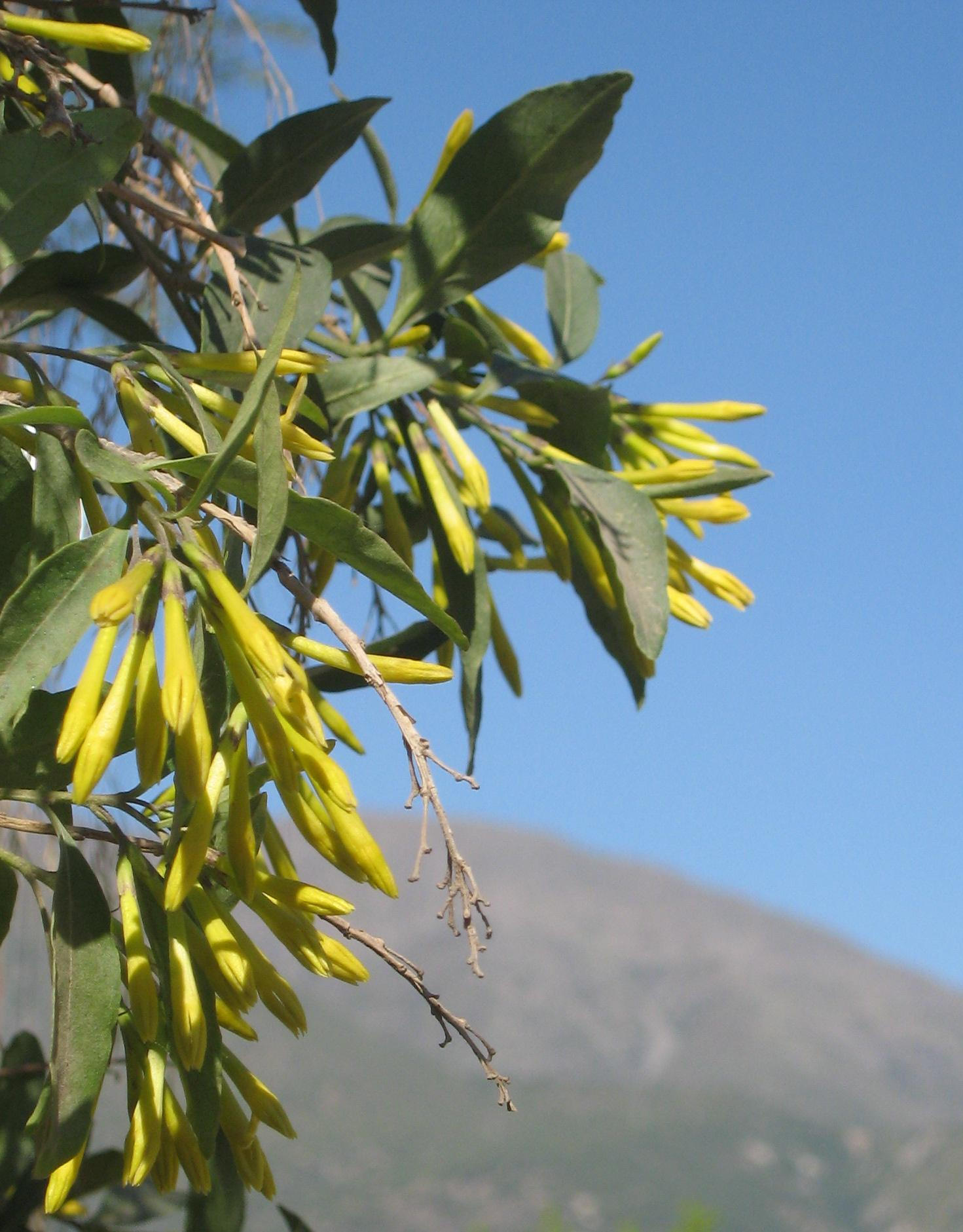 Cestrum parqui L'Her., Argentina, Brasil, Chile Uruguay , naturalizada en la región mediterránea de Europa.